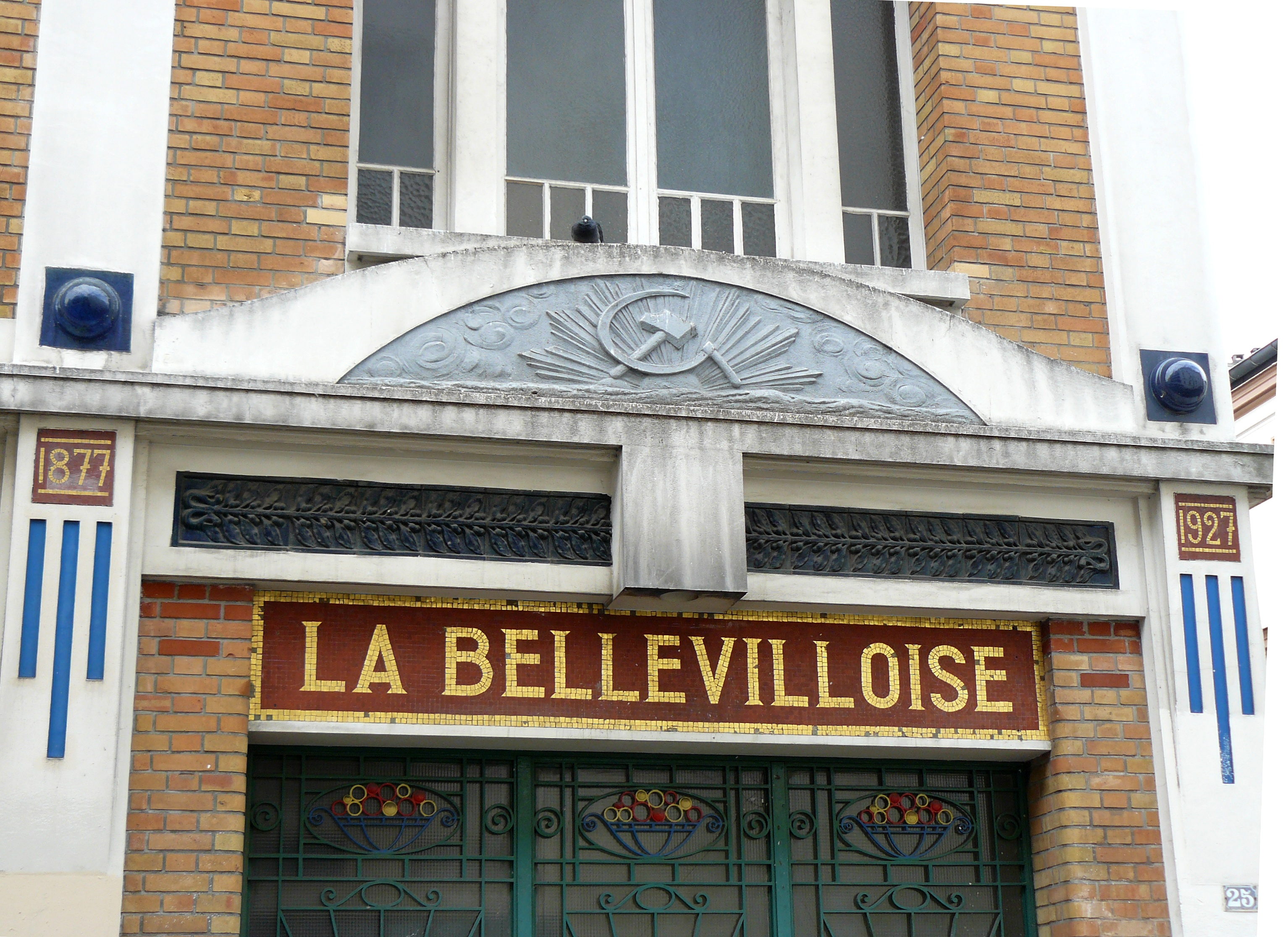 Facade de la Maison du peuple, ""La Bellevilloise" Rue Boyer (Paris 20ème arrd.). Construite en 1910 et rénovée en 1977.